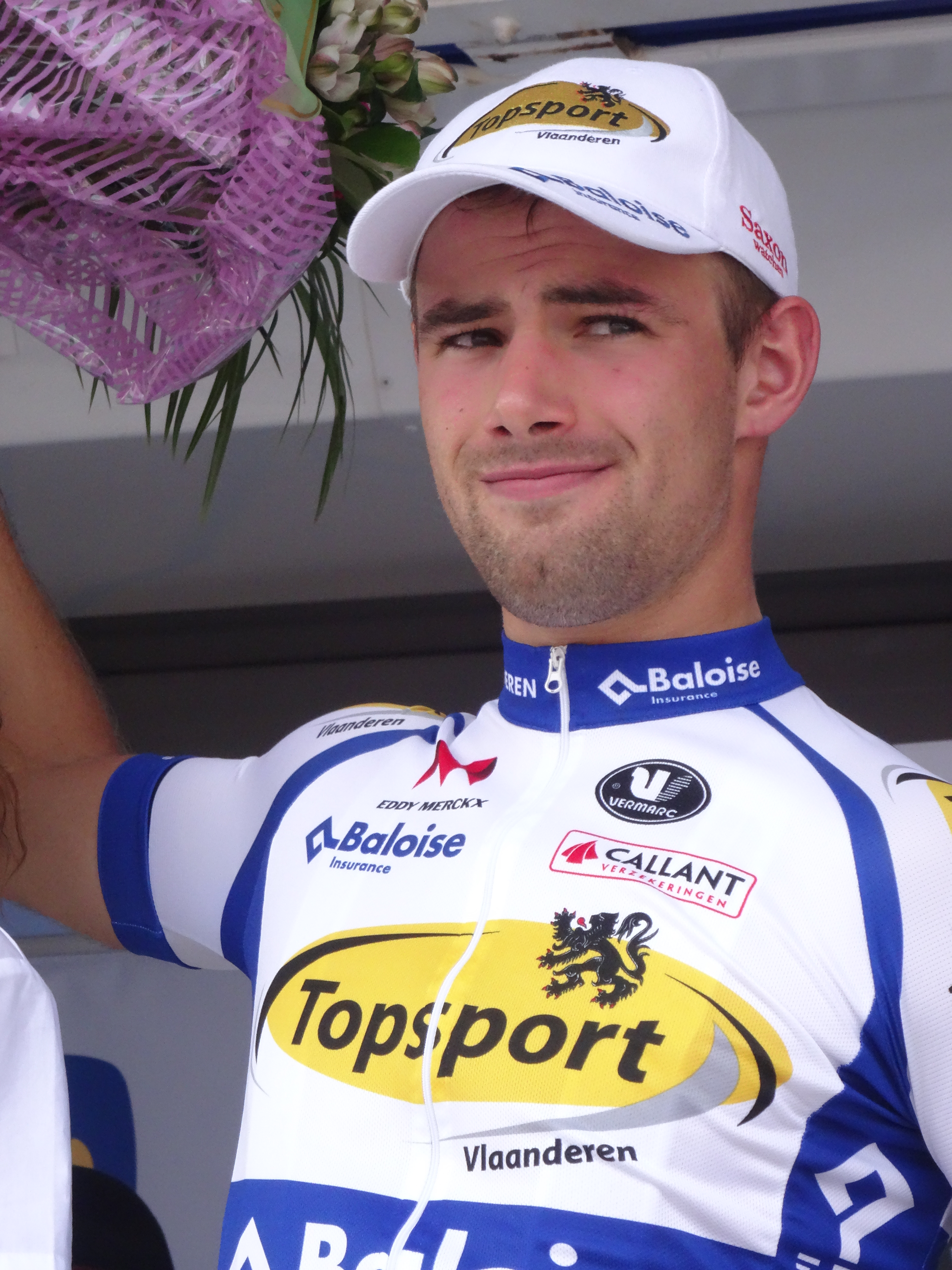 Reportage photographique réalisé le dimanche 7 septembre à l'occasion du départ et de l'arrivée du Grand Prix de Fourmies 2014 à Fourmies, Nord-Pas-de-Calais, France.